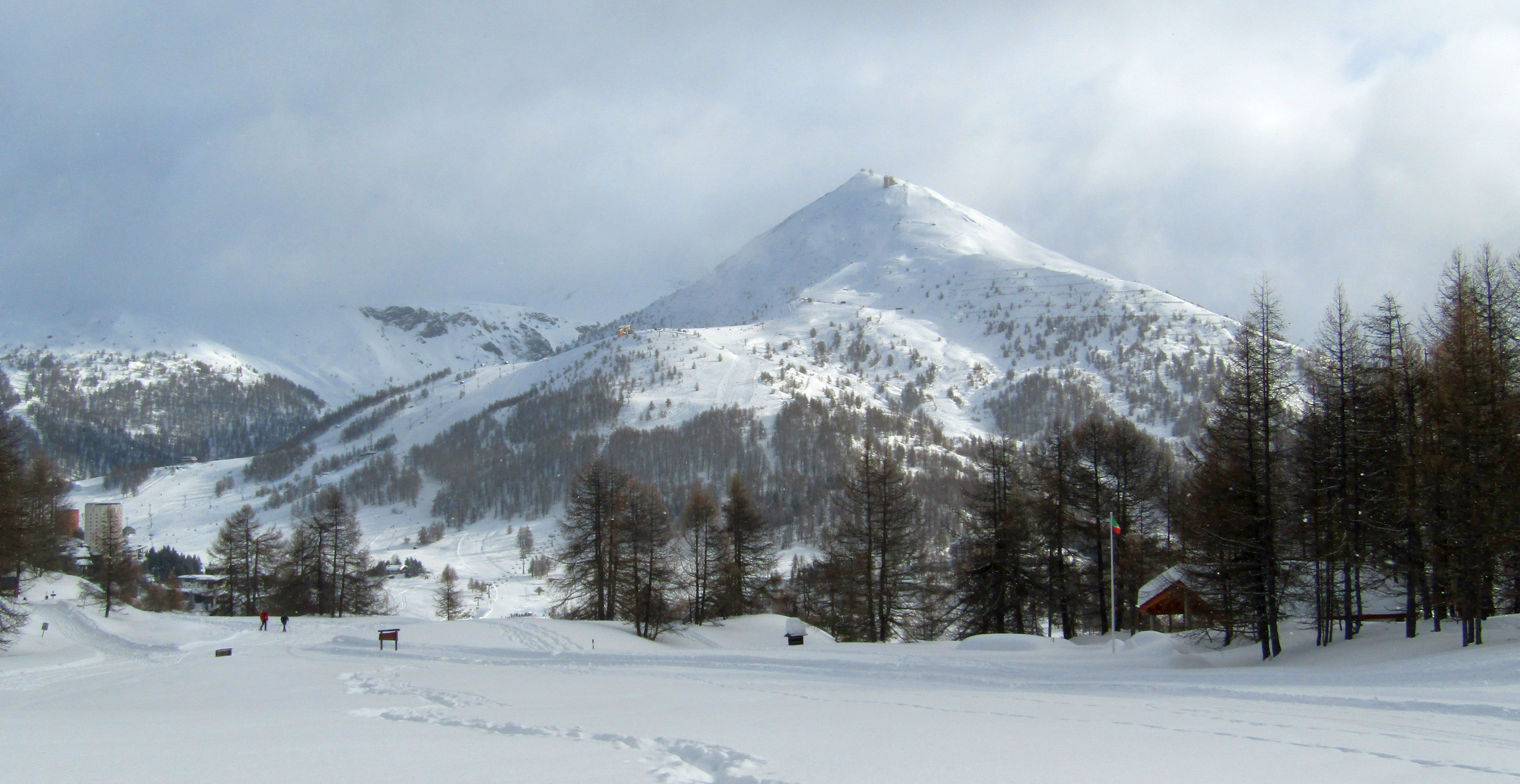 Monte Sises visto dalla pista di fondo delle Marmotte (Sestriere)